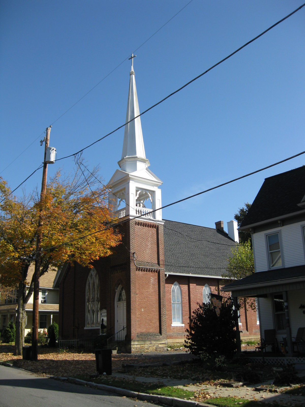 Snydertown, Pennsylvania